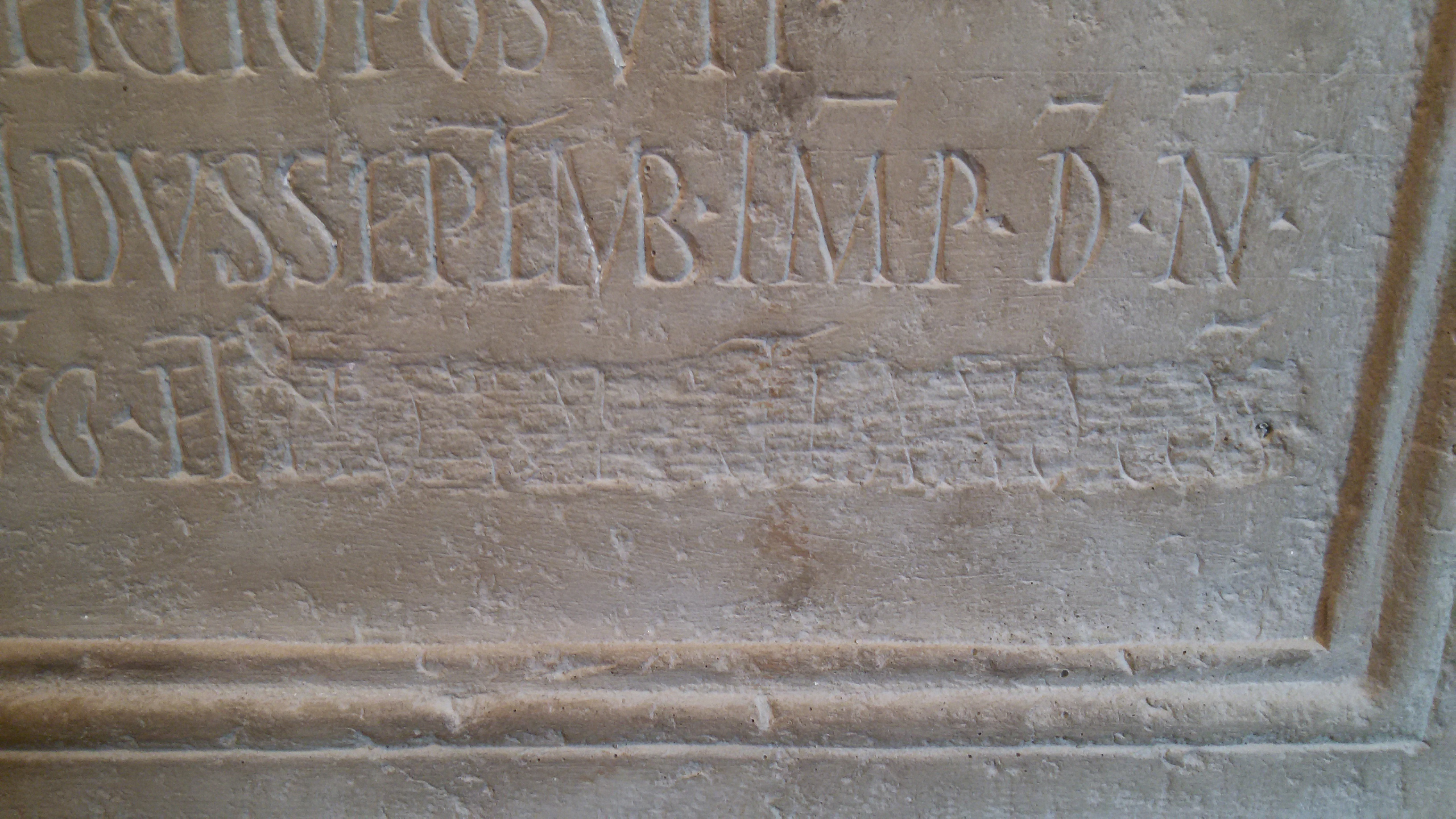 Abguss des Augsburger Siegesaltars im Alamannenmuseum Ellwangen, eradierte Stelle in der letzten Zeile mit erkennbaren Resten der Nennung eines Konsuls namens Honoratianus